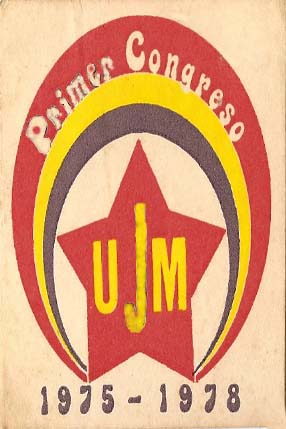 Logo de la Unión de Juventudes Maoistas, UJM, esta pegatina fue publicada a finales de 1977, para preparar el 1º Congreso de la UJM, que se celebró en enero de 1978, en Madrid